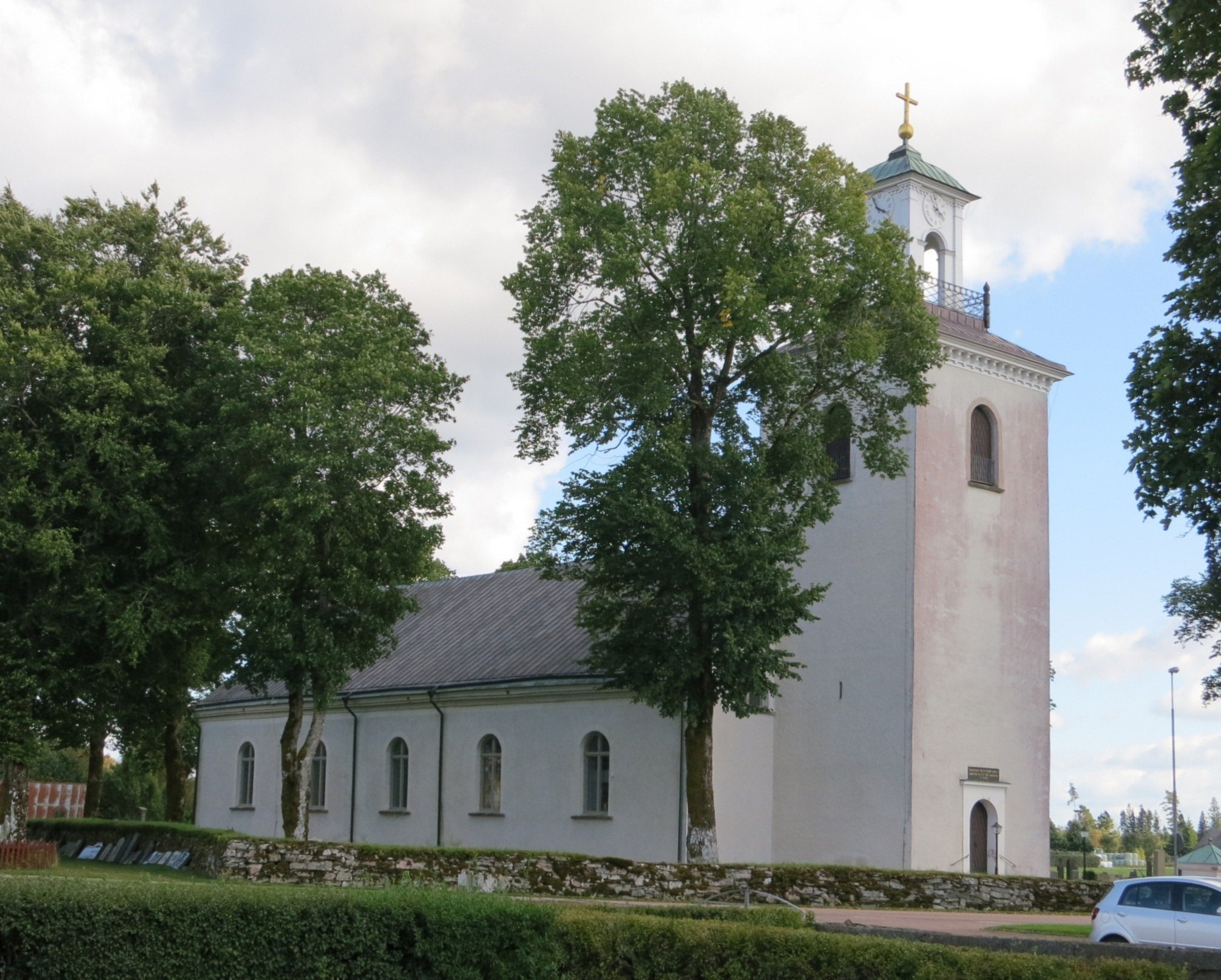 Långaryds kyrka i Hylte kommun i Halland